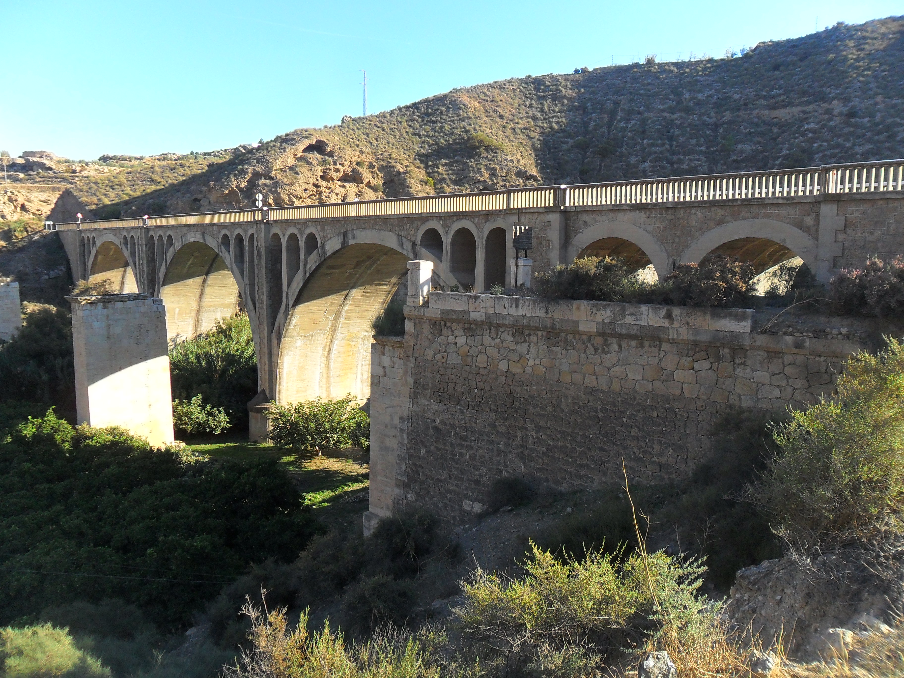 Puente de los Imposibles, cerca de Terque